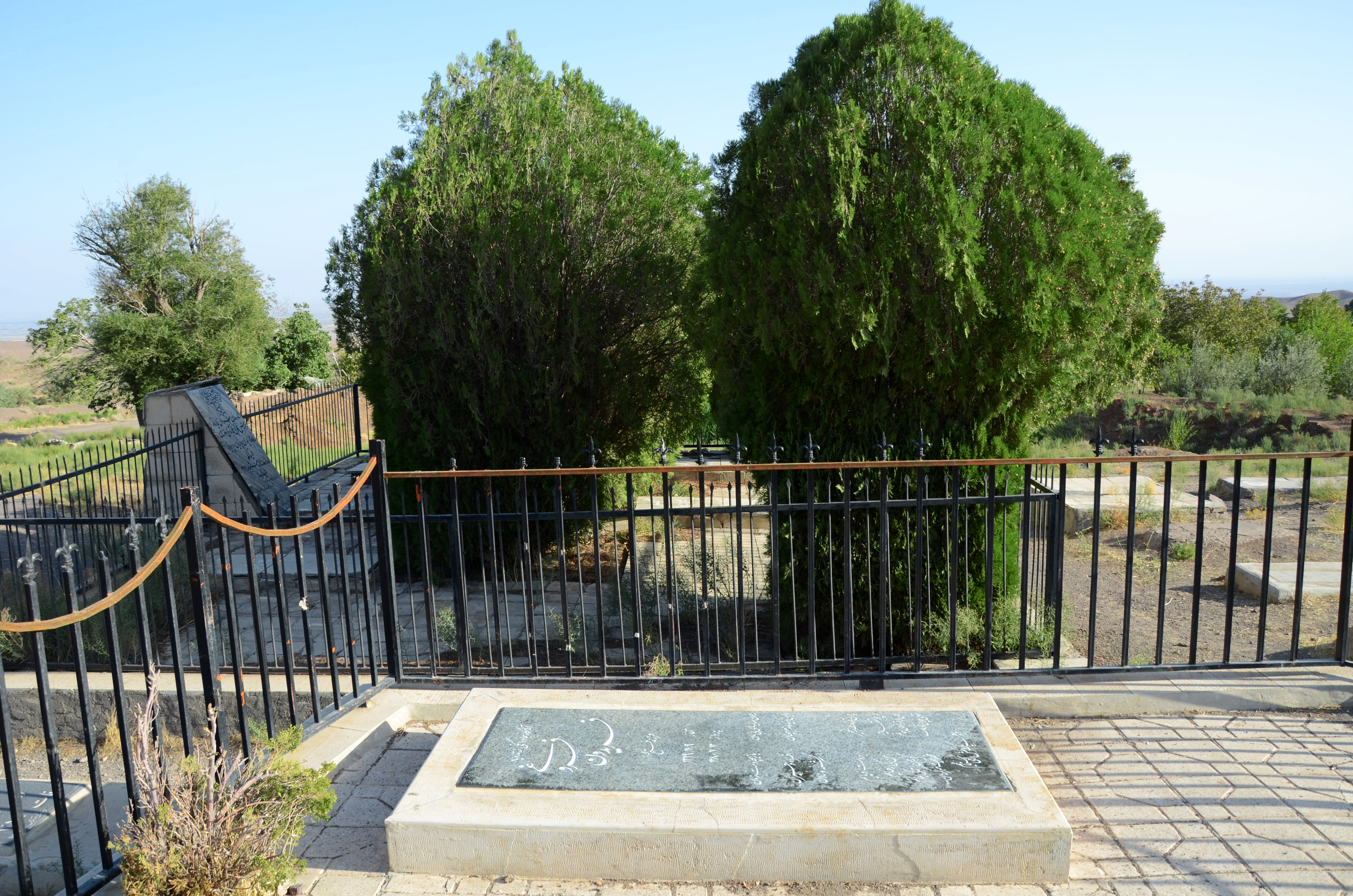 آرامگاه زنده یاد فریدون فروغی - روستای غورغورک